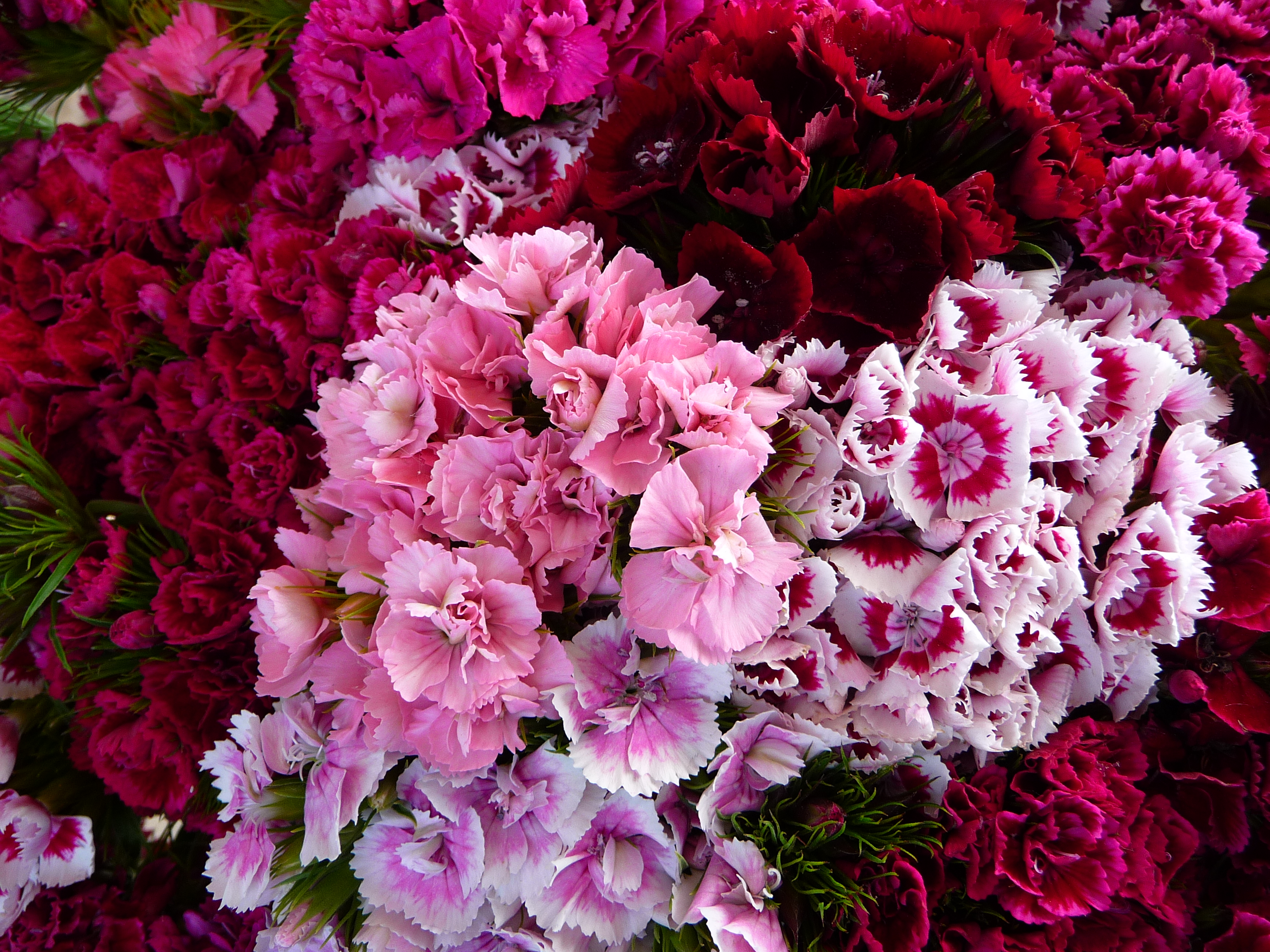 Bartnelken (Dianthus barbatus) zum Strauß gebunden